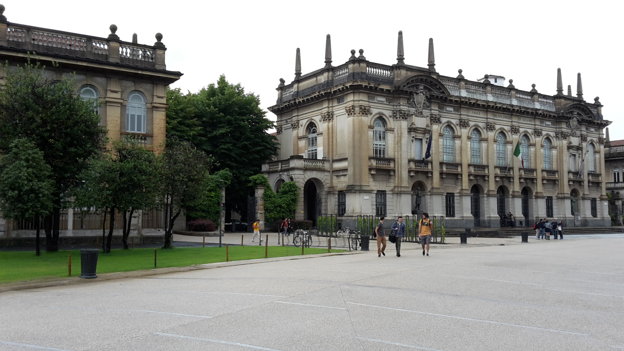 Ingresso del Politecnico di Milano visto da piazza Leonardo da Vinci